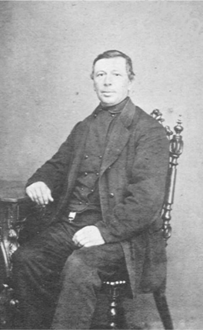 Cornelis Pijper (1830 - 1907), burgemeester van Hoogwoud